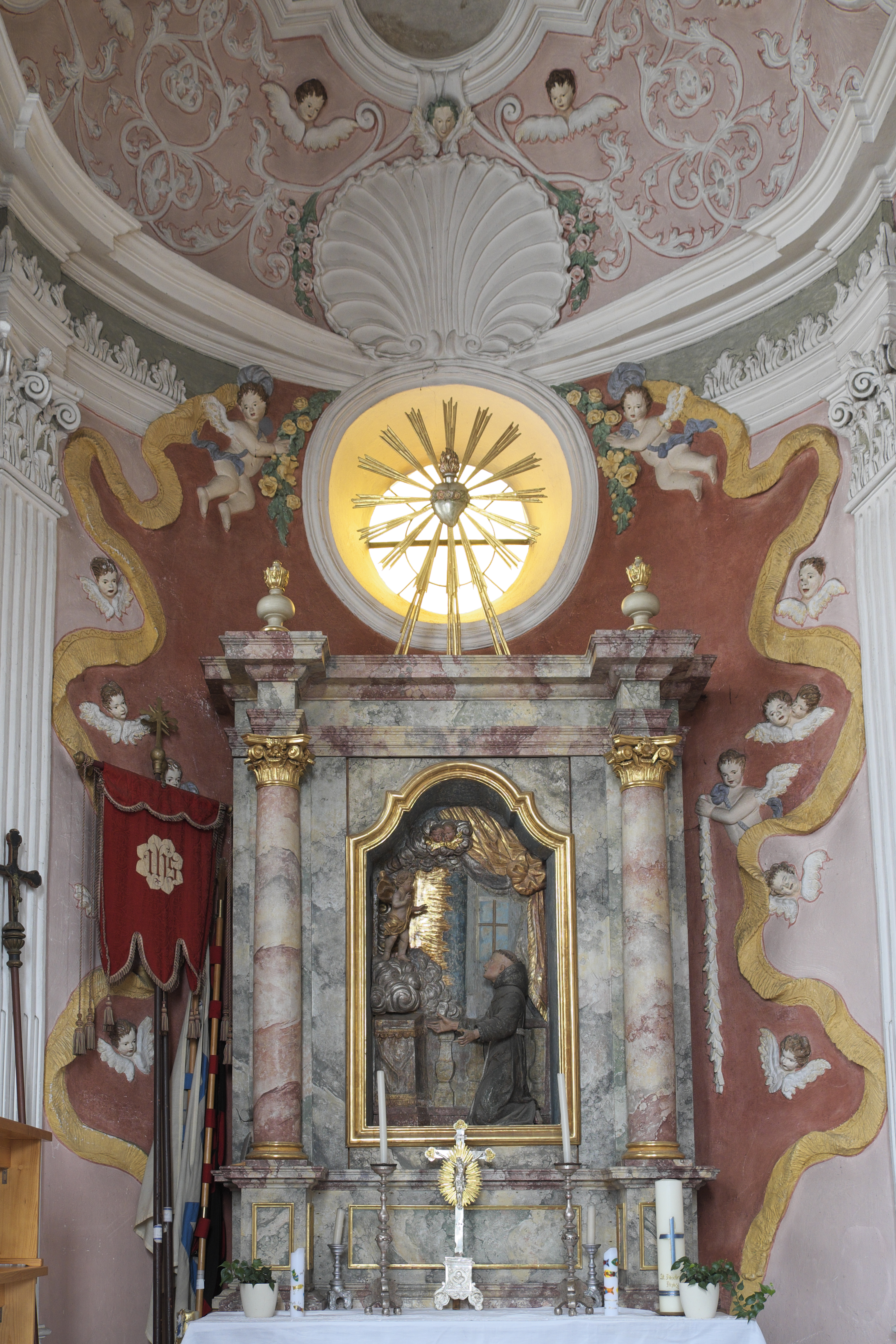 Katholische Pfarrkirche St. Andreas in Aying im Landkreis München (Bayern/Deutschland), Antoniuskapelle, Altar mit Figur des heiligen Antonius von Padua